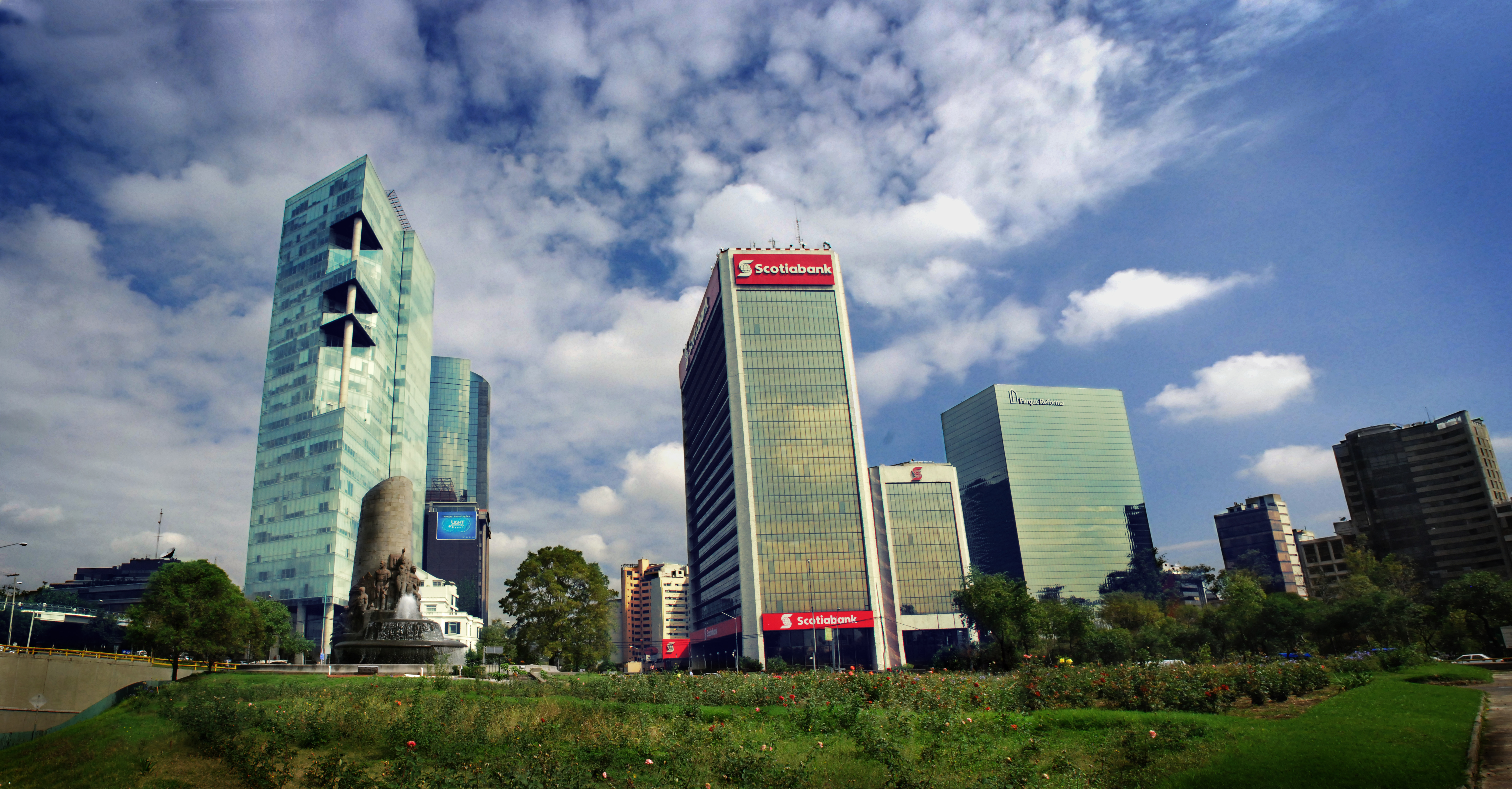 Monumento a Fuente de Petróleos